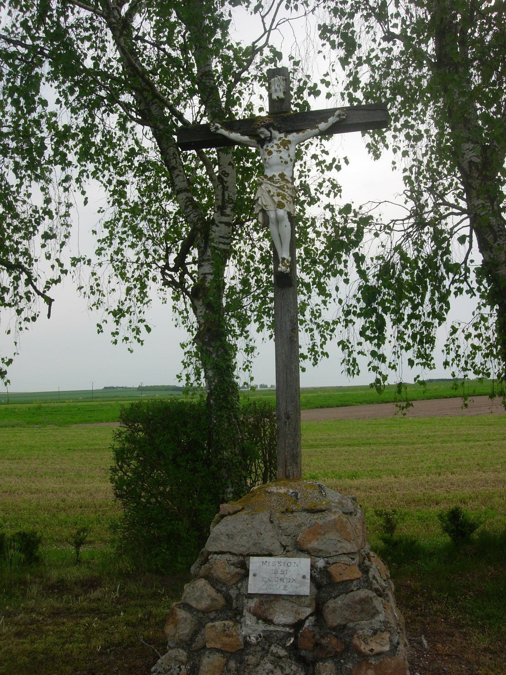 Prunay-Belleville (Aube) : croix de chemin